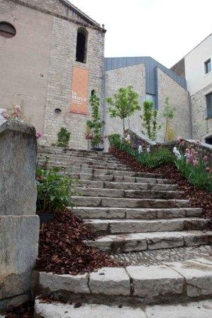 Façana Centre Cultural La Mercè